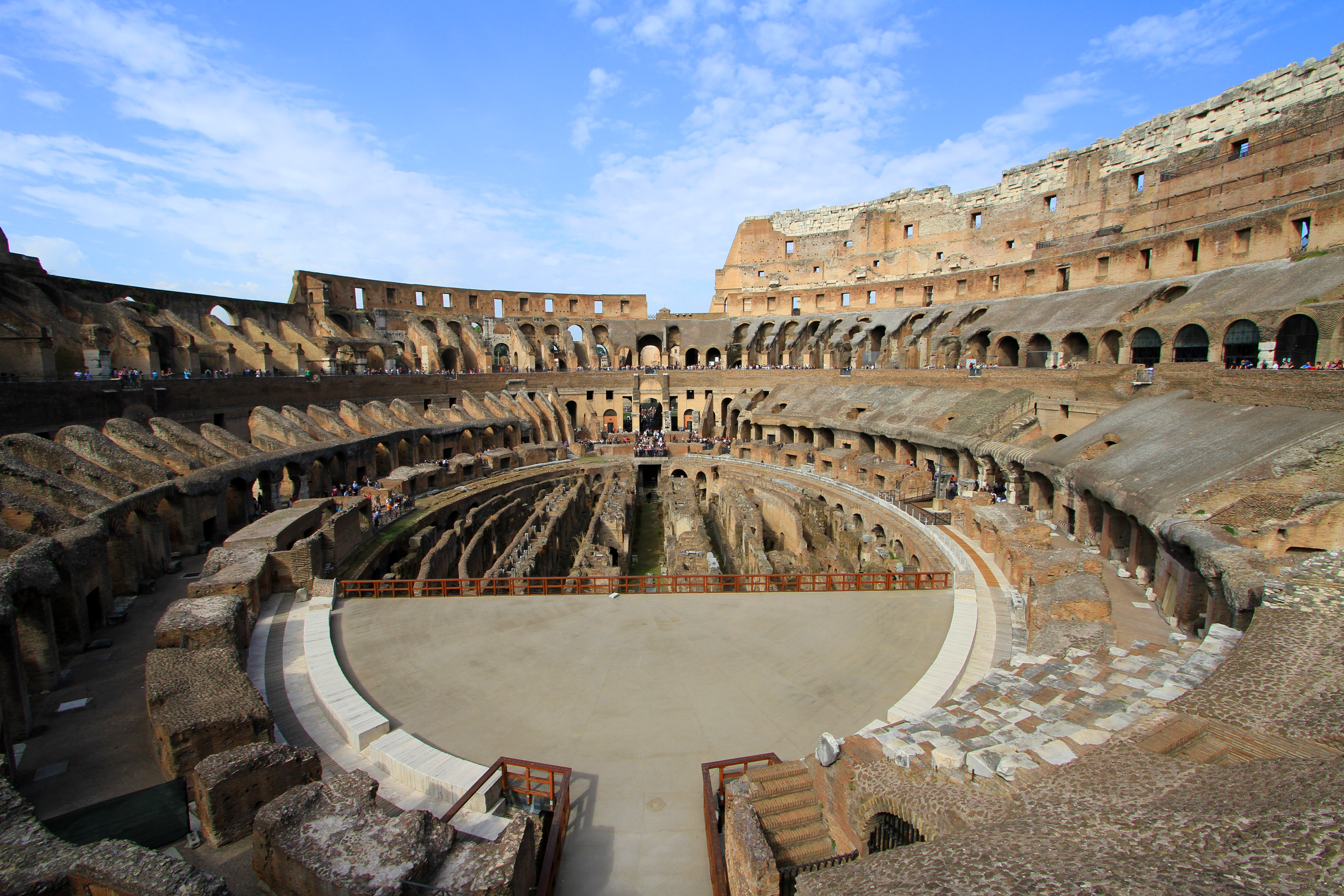 Anfiteatro Flavio (72-80 d.C.)